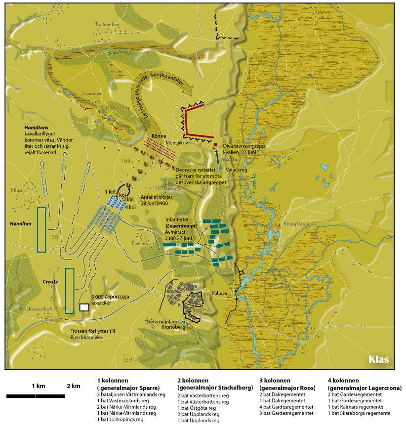 Källa Karl XII på slagfältet. Illustration: Klas Sandberg.